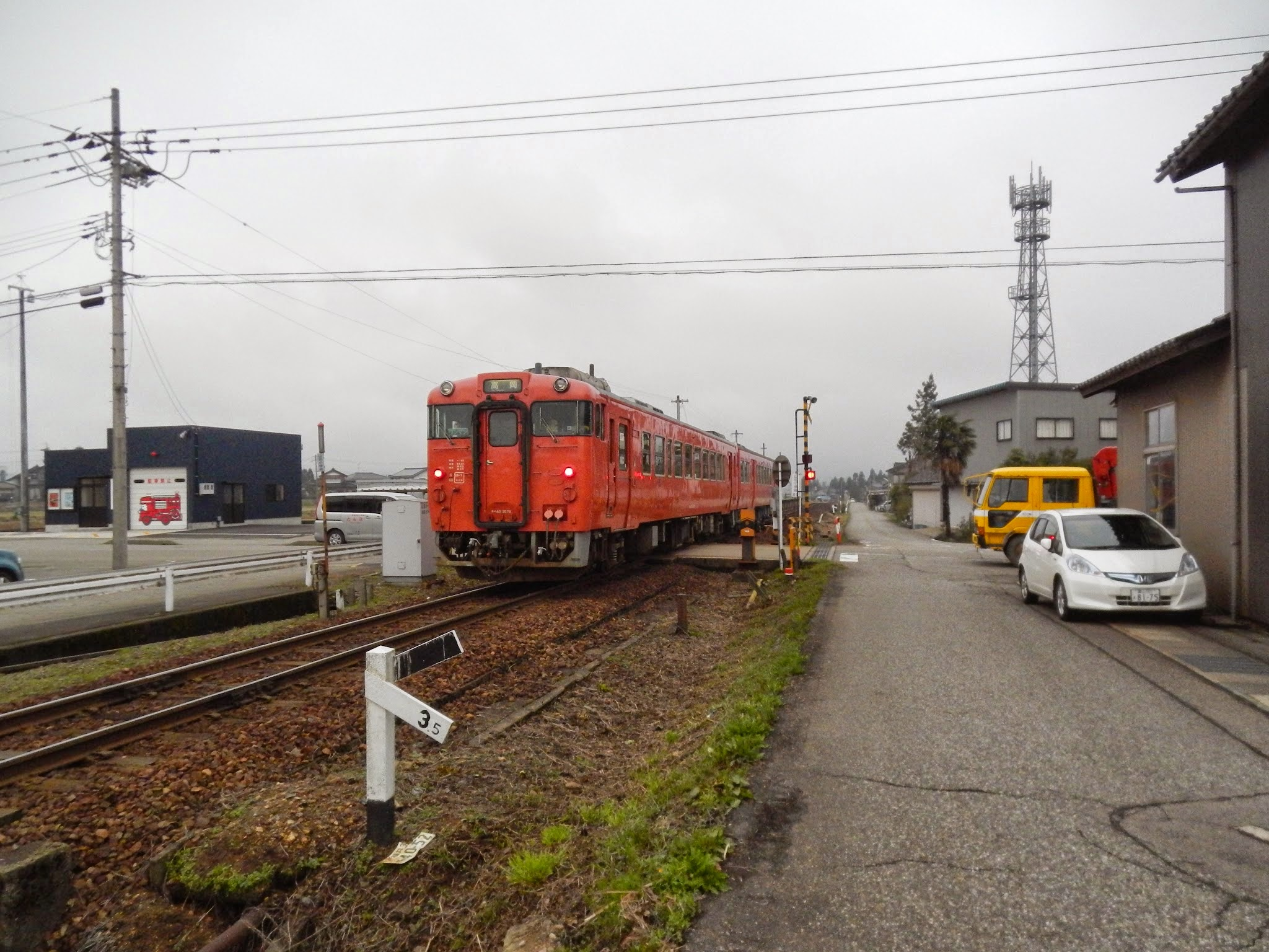 Takebayashi, Nanto, Toyama Prefecture 939-1734, Japan